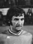 Photo de Gérard Farison en 1976.